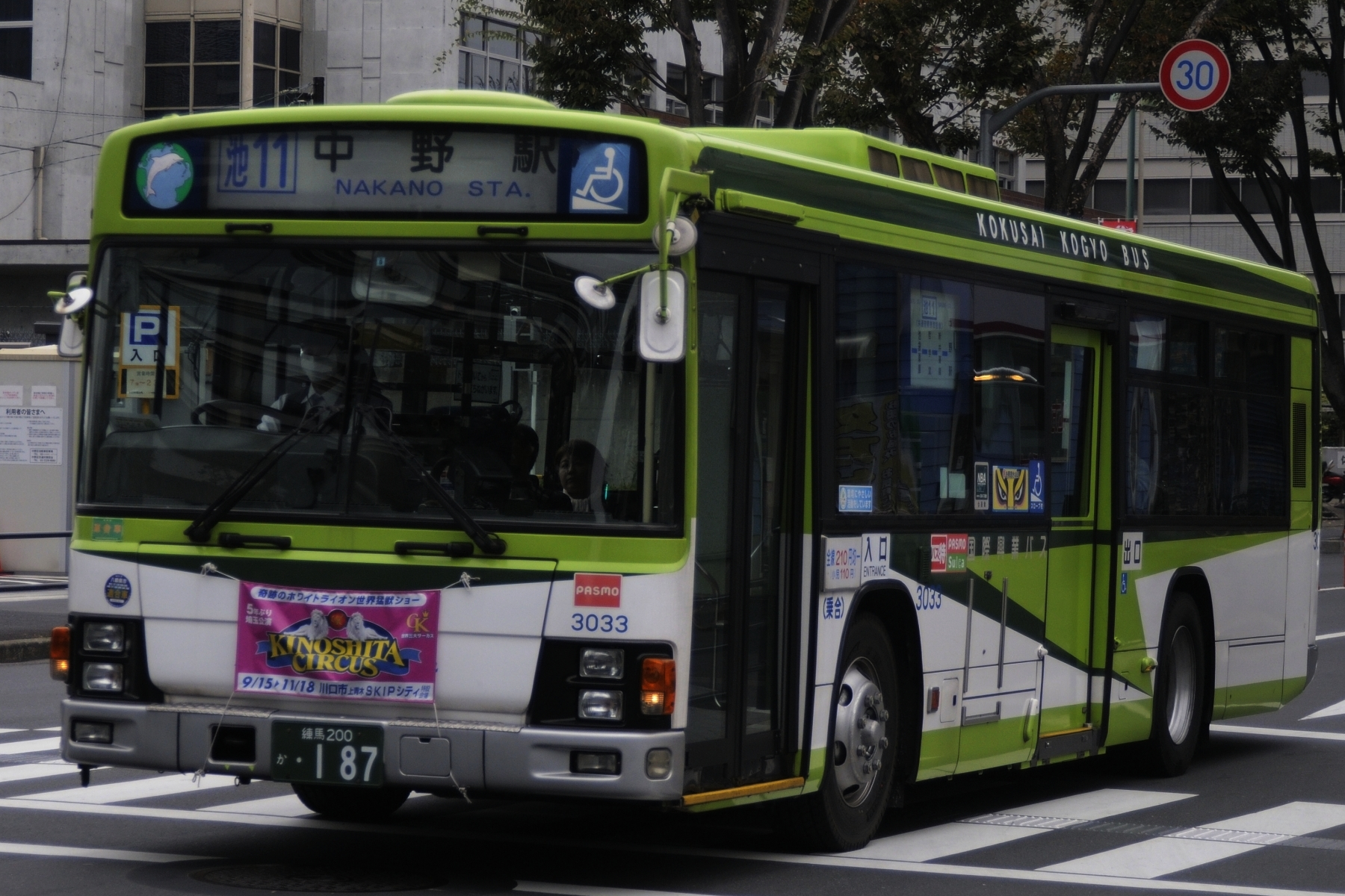 国際興業バス旧3033号車。関東バスとの共同運行路線である池11として中野に姿を見せた時。